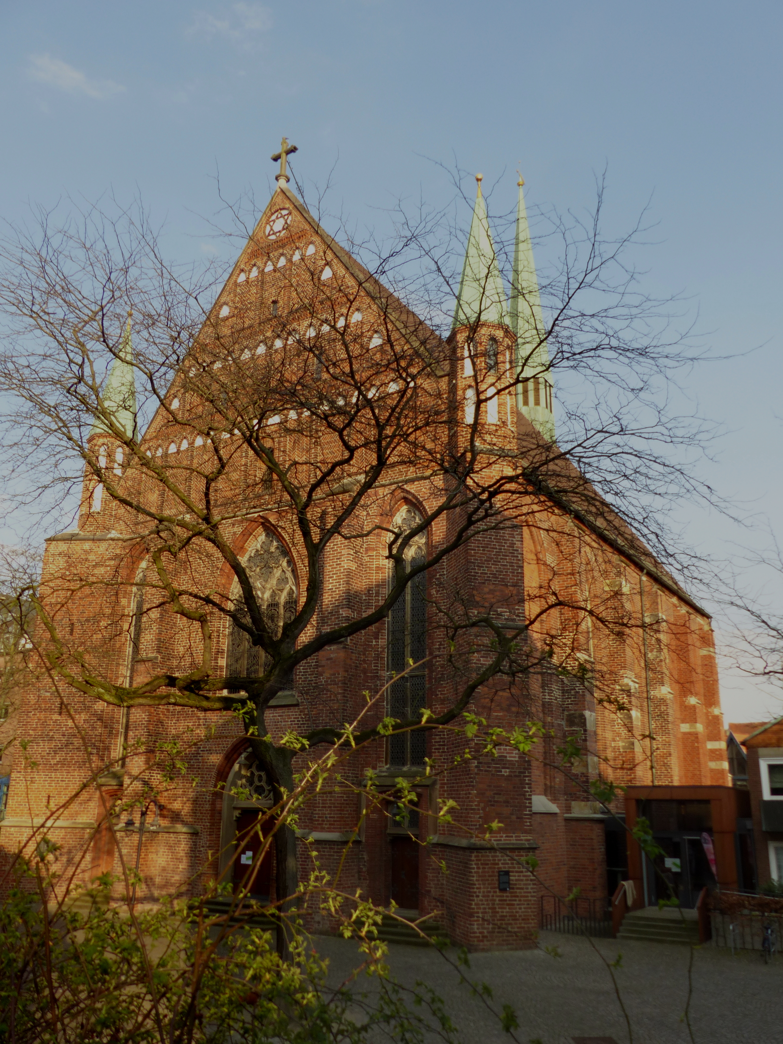 Kirche St. Johann, Schnoor, Bremer Altstadt